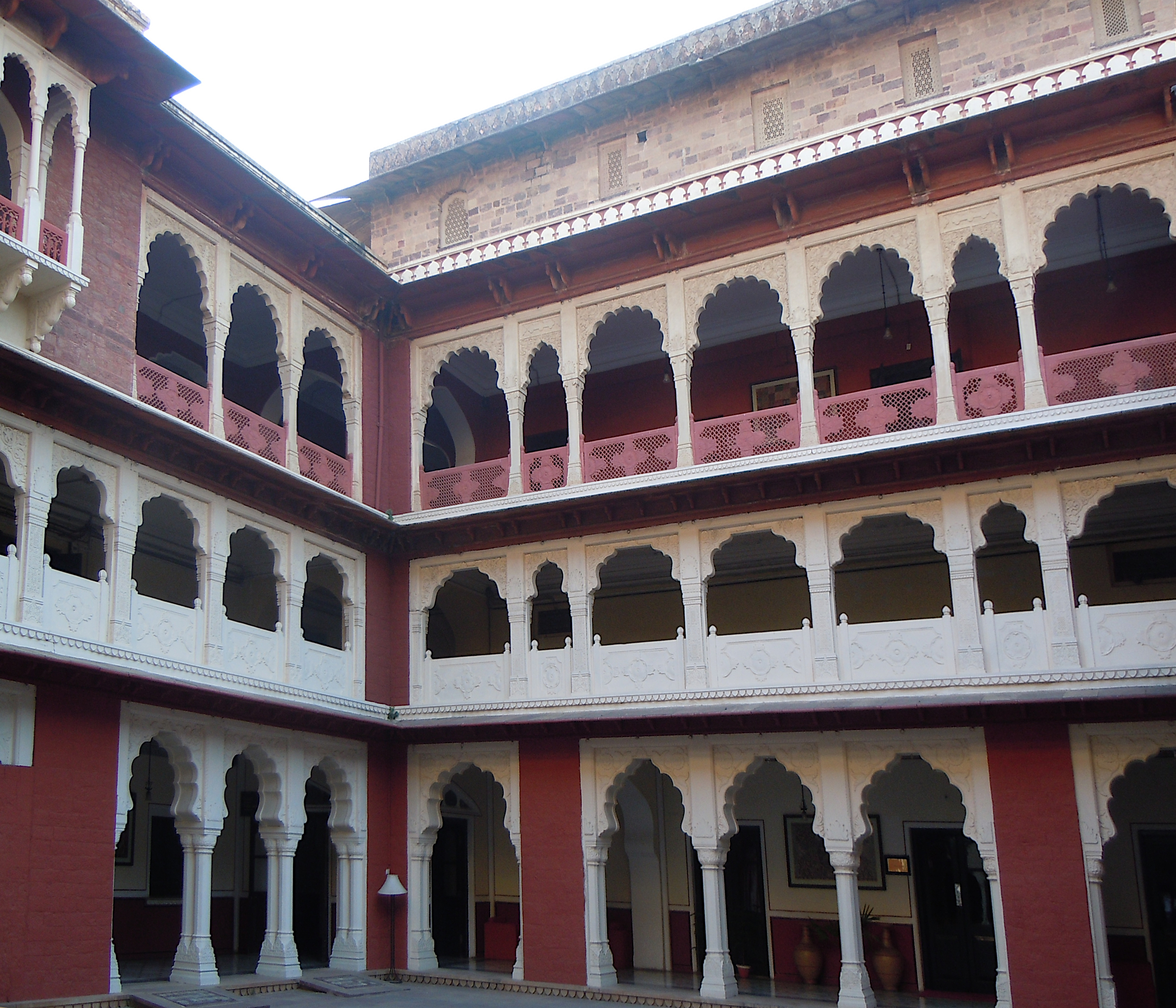 Umed Bhawan Palace cour interieure, Kota, Rajasthan